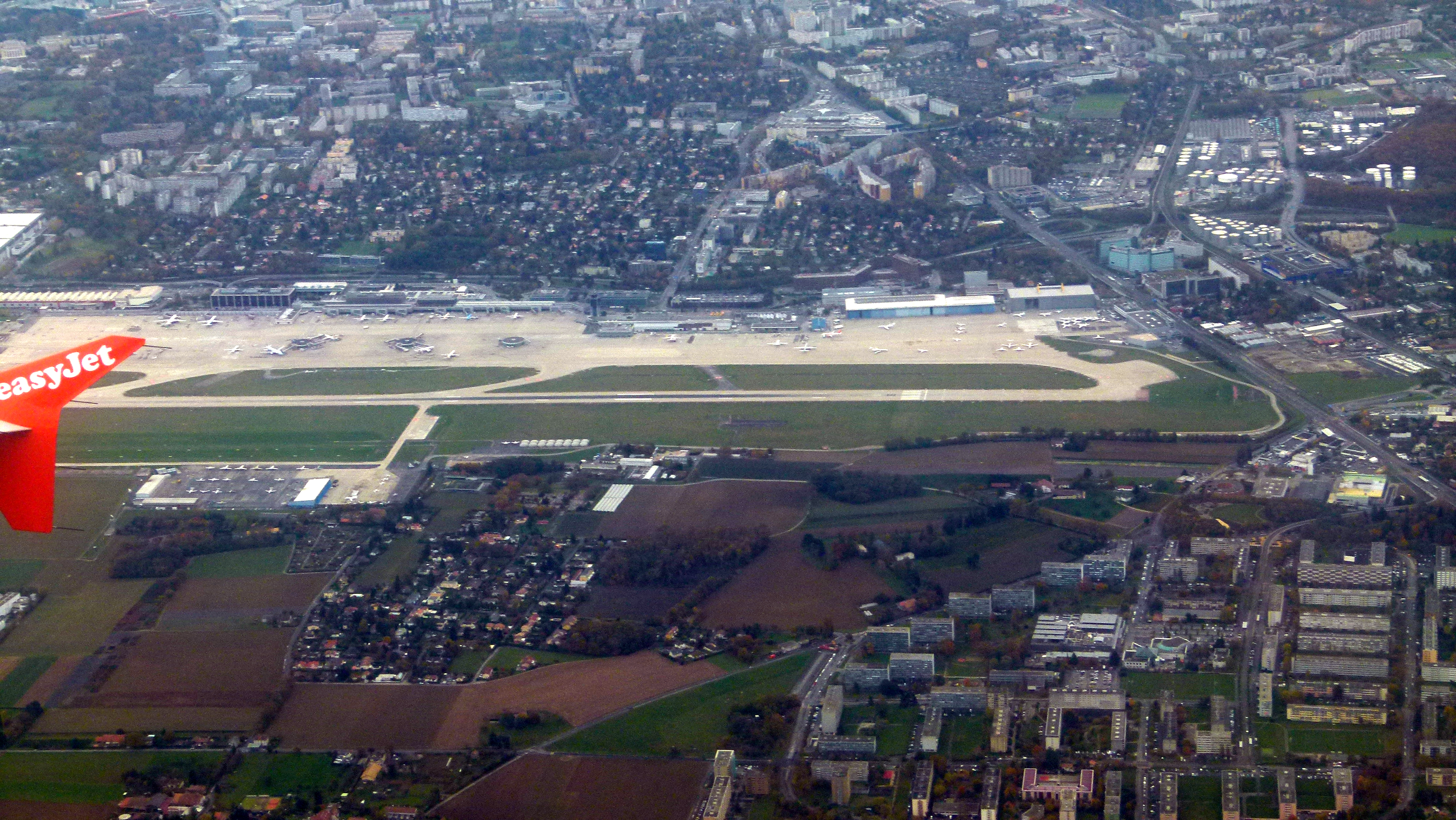 Blick auf Meyrin-Cointrin-Mategnin mit Teil des Flughafens Genf